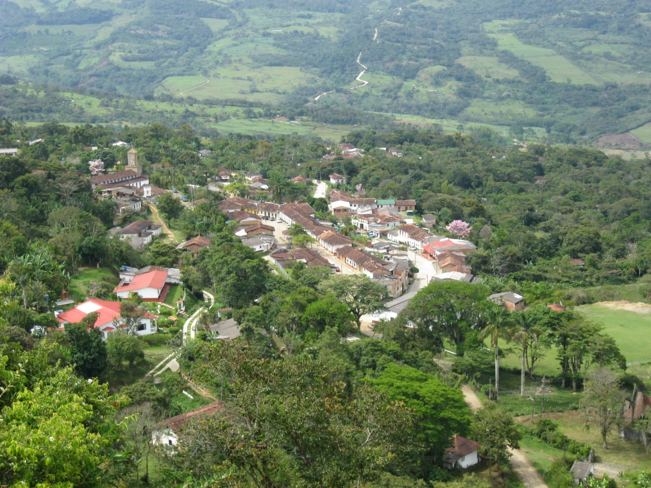 Panorámica de San José de Suaita, Santander, Colombia tomada desde la meseta.